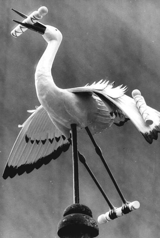 Dresden, Herta-Lindner-Straße, Brunnen ADN-ZB Häßler 2.9.1986 Dresden: Restaurierter Brunnen-Im Zentrum Dresdens, an der Herta-Lindner-Straße, befindet sich der älteste Brunnen der Stadt. Der Queckbrunnen wurde schon 1461 erwähnt. Der Überlieferung nach soll sein Wasser Kinderwünsche erfüllen helfen - daher der Storch auf dem Brunnendach. Die Symbolfigur, die vier Wickelkinder trägt, wurde kürzlich restauriert und wieder aufgesetzt. - siehe auch 1986-0902-006